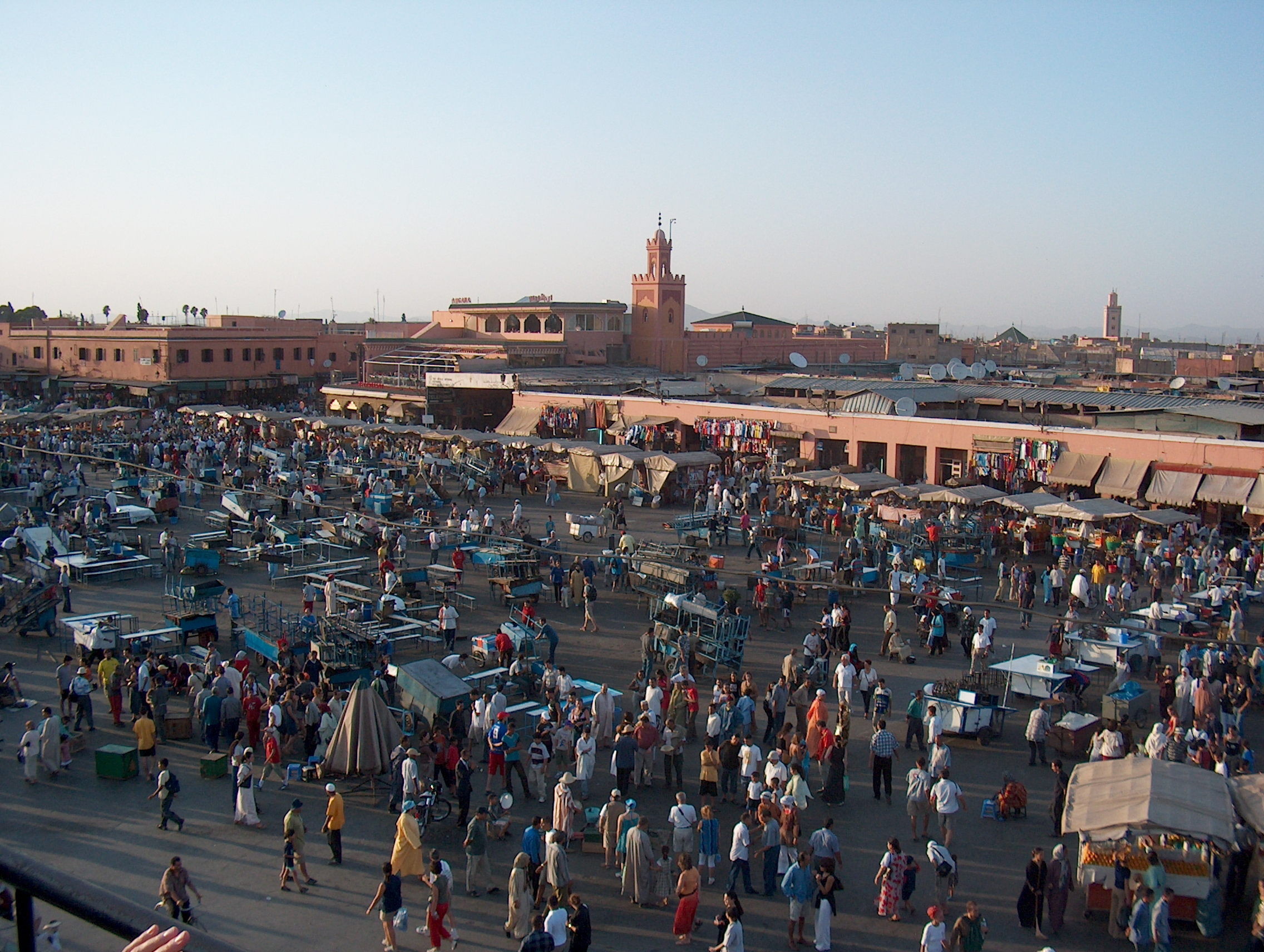 Djemaa el Fna square in the evening